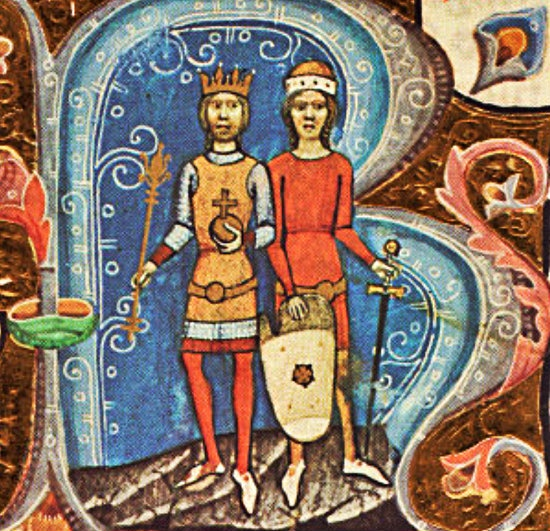 Solomon of Hungary and his brother, Prince David